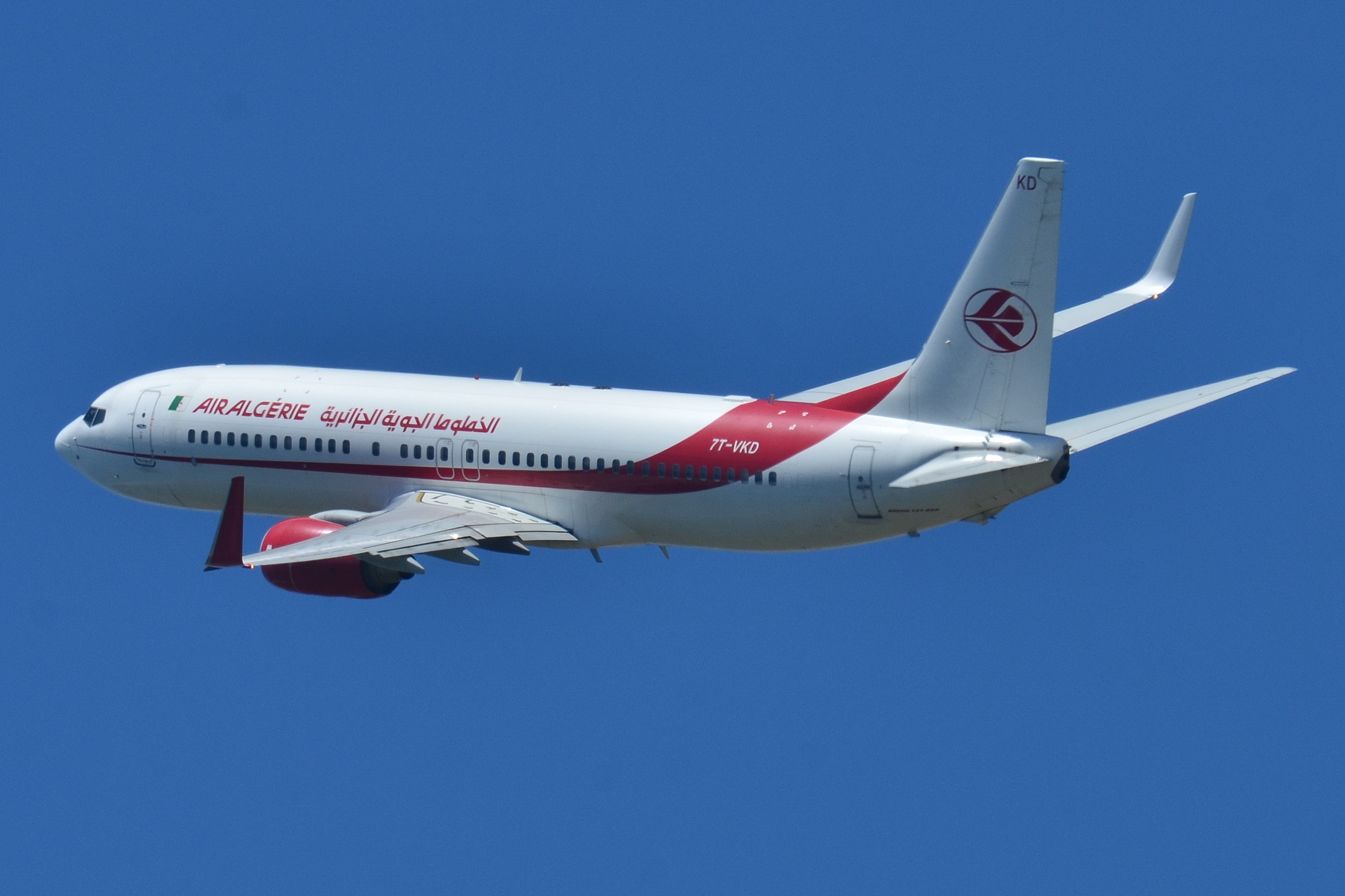 Photo prise à l'aéroport de Barcelone-El Prat (LEBL) en Espagne. Picture take at Barcelona-El Prat Airport (LEBL) in Spain.